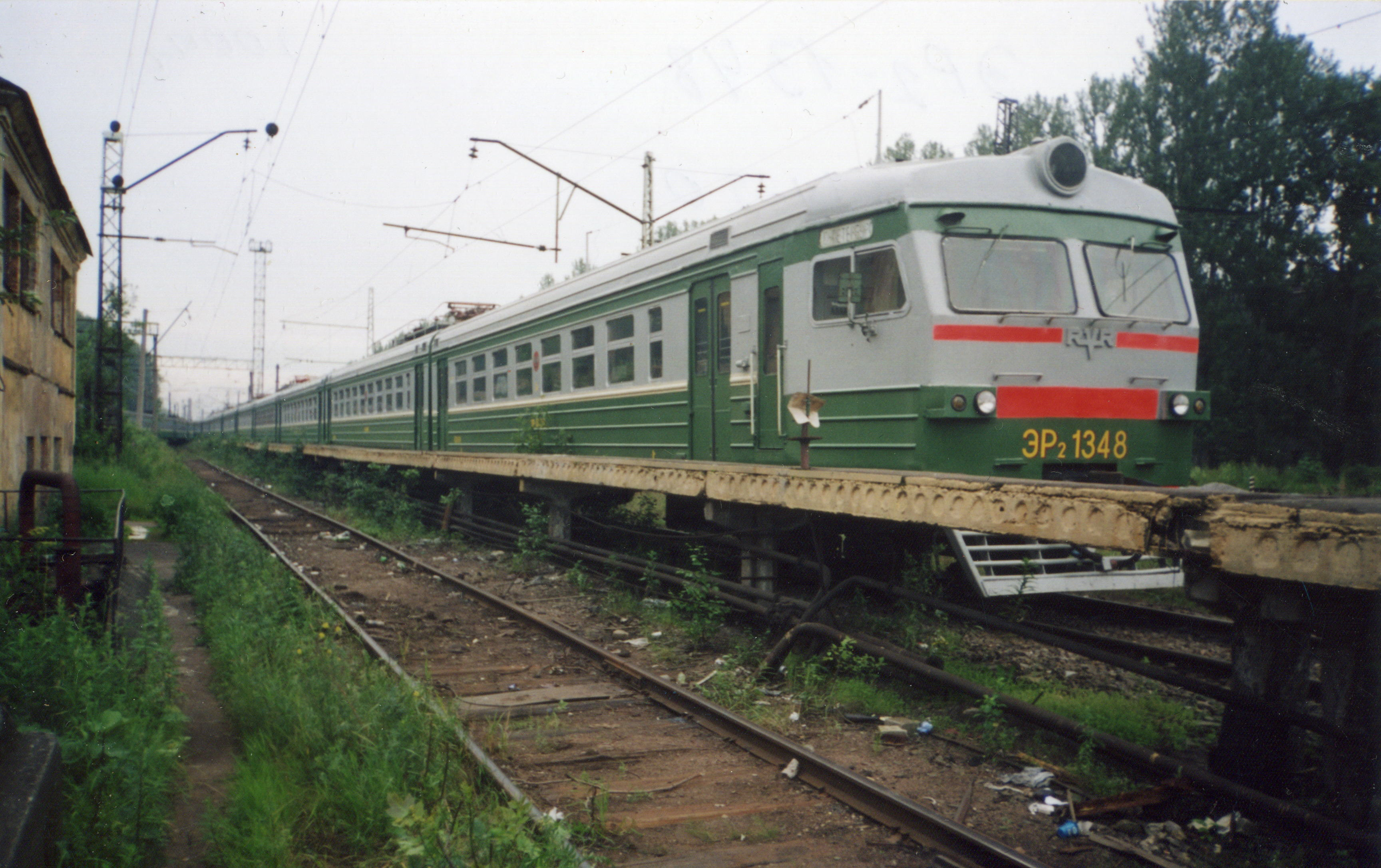 Электропоезд ЭР2-1348 в депо Петербург-Финляндский-Пассажирский (после КР-1)